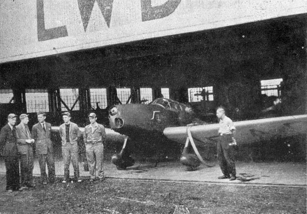 LWD Zuch-1, prototyp. Ve skupince vlevo uprostřed konstruktér Tadeusz Soltyk